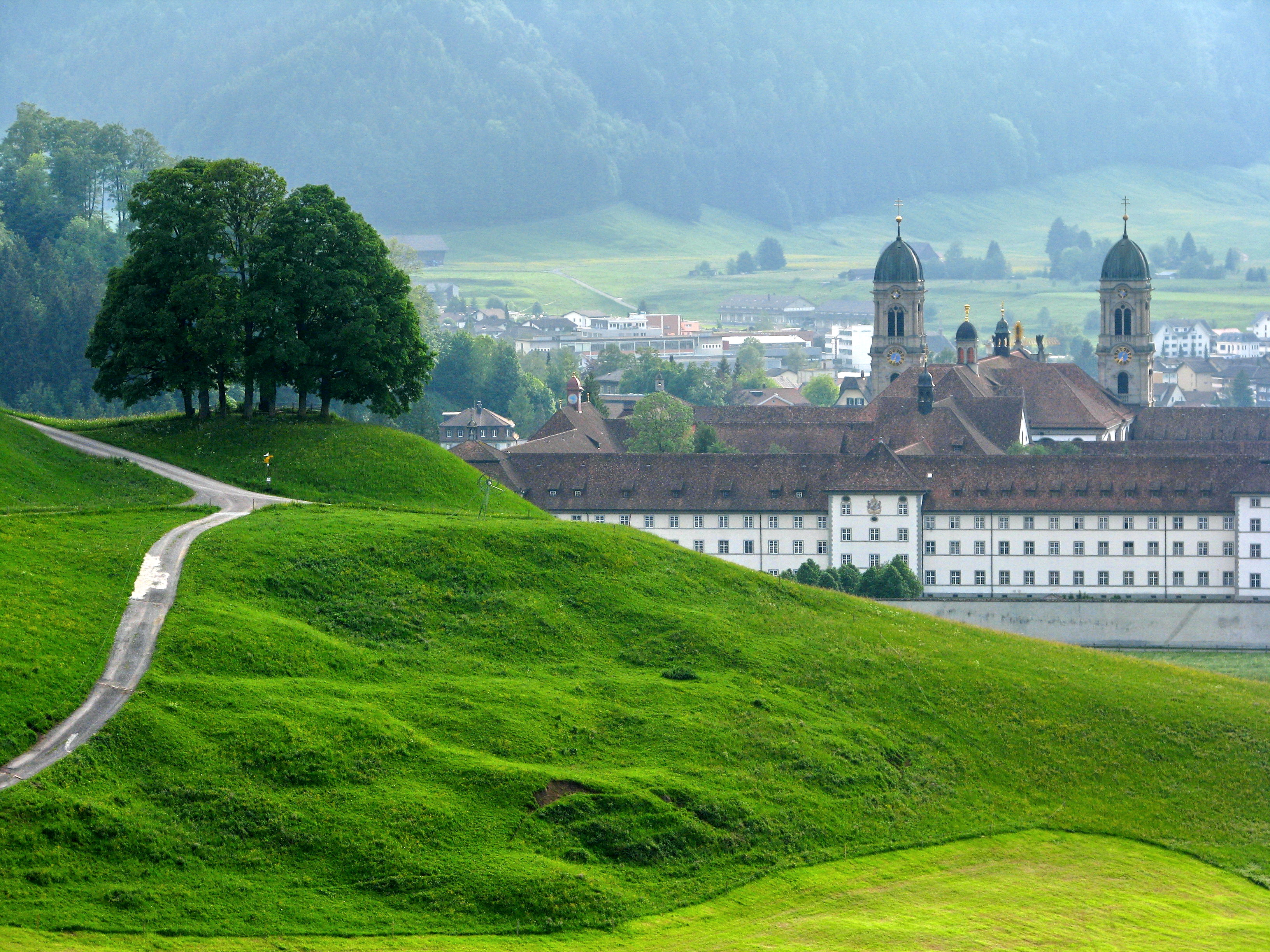 Abbey church in Einsiedeln (SZ) in Switzerland